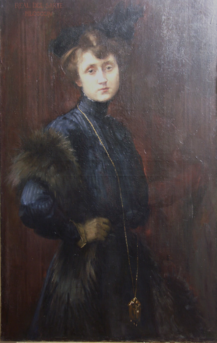 portrait de Thérèse Geraldy (1904) tableau de Magdeleine Real del Sarte sa tante